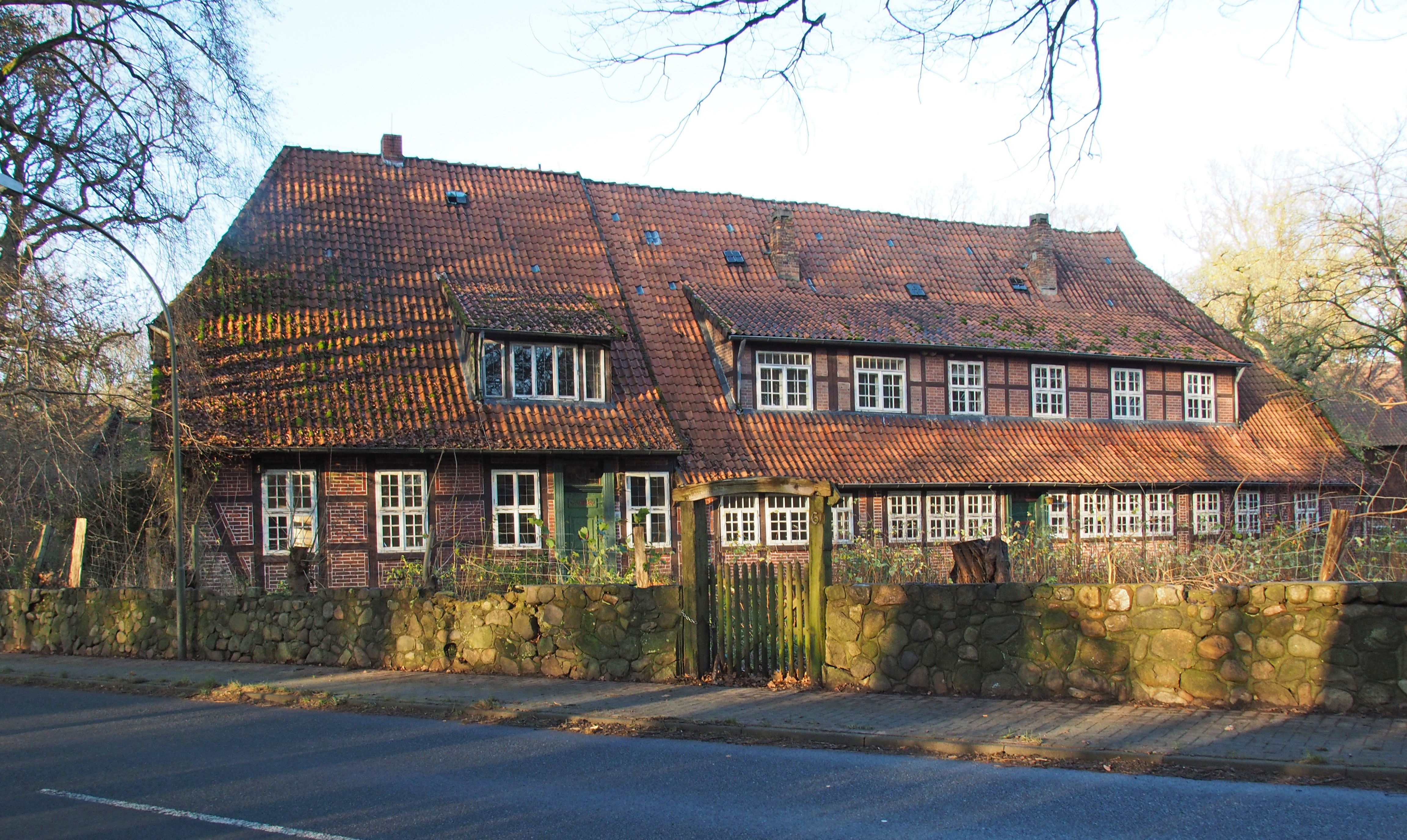 Wohngebäude ehemals Hof von der Ohe in Oberohe, Gemeinde Faßberg, Niedersachsen